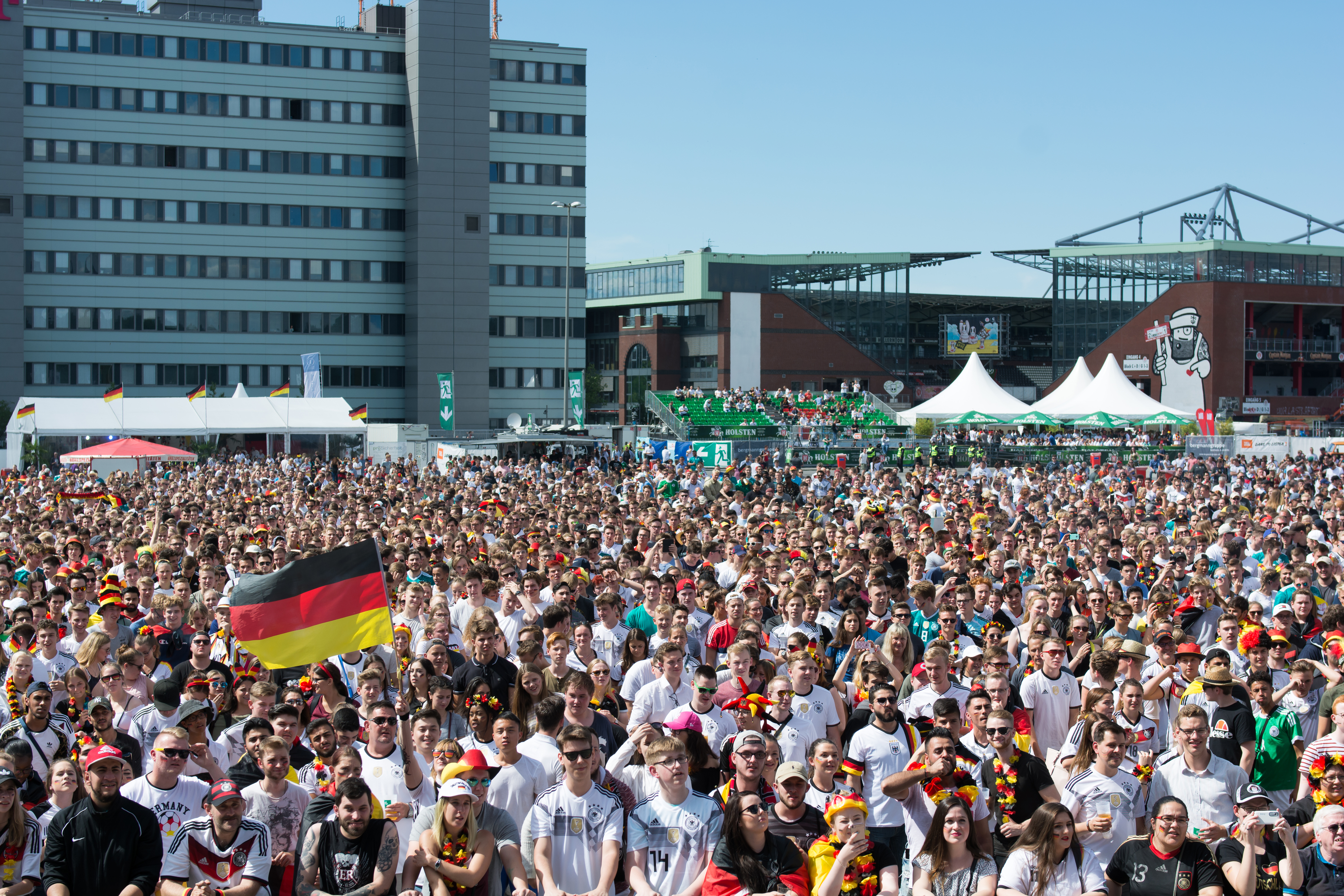 Impressionen vom Public Viewing Vorrundenspiel Südkorea - Deutschland auf dem Fan Park Hamburg